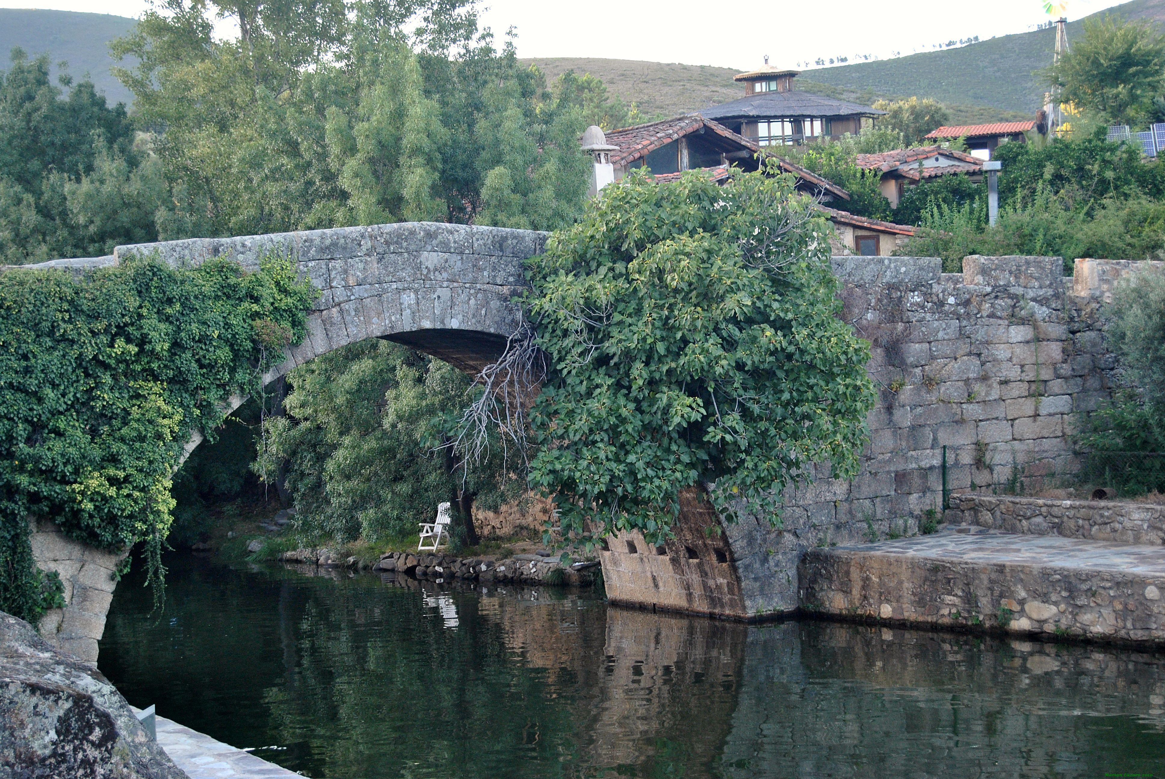 Riveras de Gata y Acebo This is a photography of a Site of Community Importance in Spain with the ID: ES4320076. Natura2000 entry, EEA entry